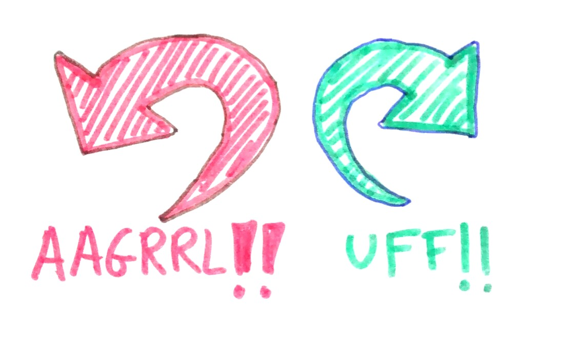 Icones que solen representar les ordres "desfés" i "refés"